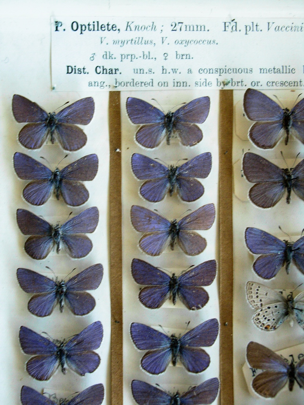 Plebejus optilete